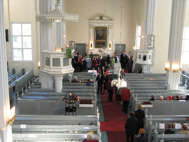 Sulkavan kirkko. Näkymä urkuparvelta kuoriin.